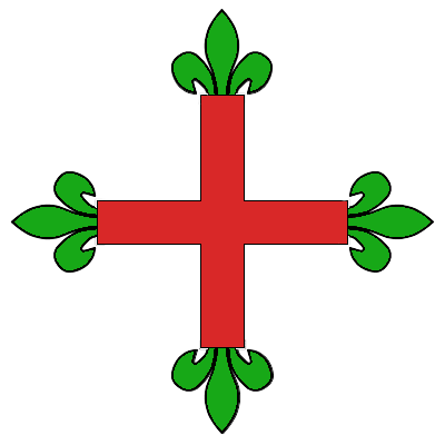 Croix de l'ordre de Montesa Auteur : Cornelis 12 avr 2005 à 11:24 (CEST)